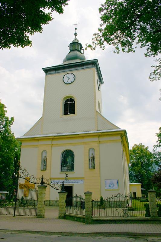 Milówka (Polska)